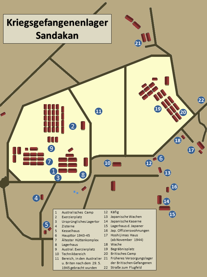 Sandakan, Sabah: Lageplan des Kriegsgefangenenlagers Sandakan (Sandakan POW Camp)